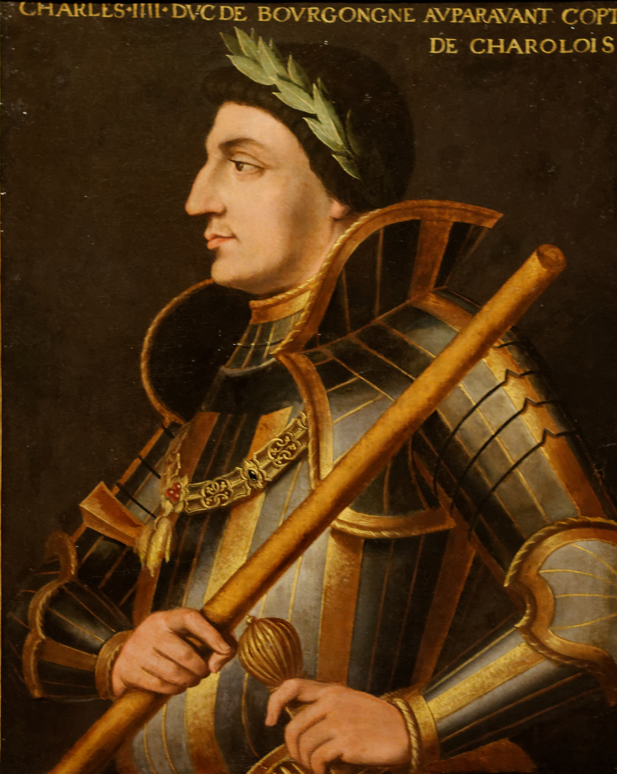 Cette représentation pourrait s'inspirer d'un portrait réalisé lors de la "Joyeuse Entrée" du Duc à Dijon en 1474 ou d'un vitrail de la Chambre de Comptes. Ces tableaux ont servi de modèle jusqu'au XVIIe siècle pour réaliser des séries de portraits des quatre ducs destinés à des bâtiments officiels ou des galeries de châteaux.